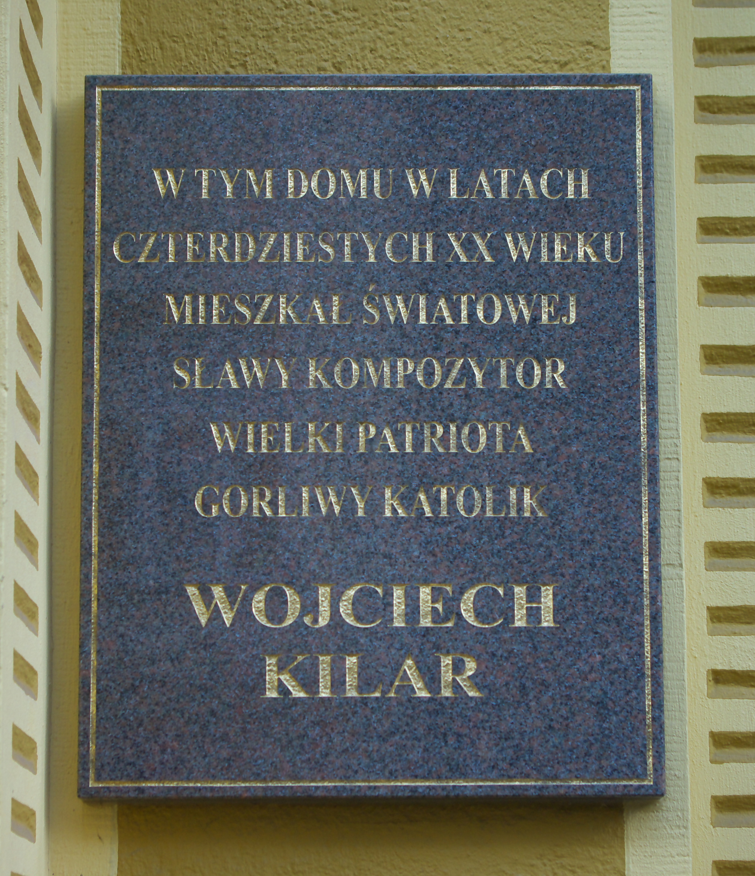 Kamienica przy ulicy Grunwaldzkiej 6 w Rzeszowie. Pierwotnie J. Schaitter i Spółka. Tablica poświęcona Wojciechowi Killarowi, zamieszkującemu w budynku w latach 40. XX wieku